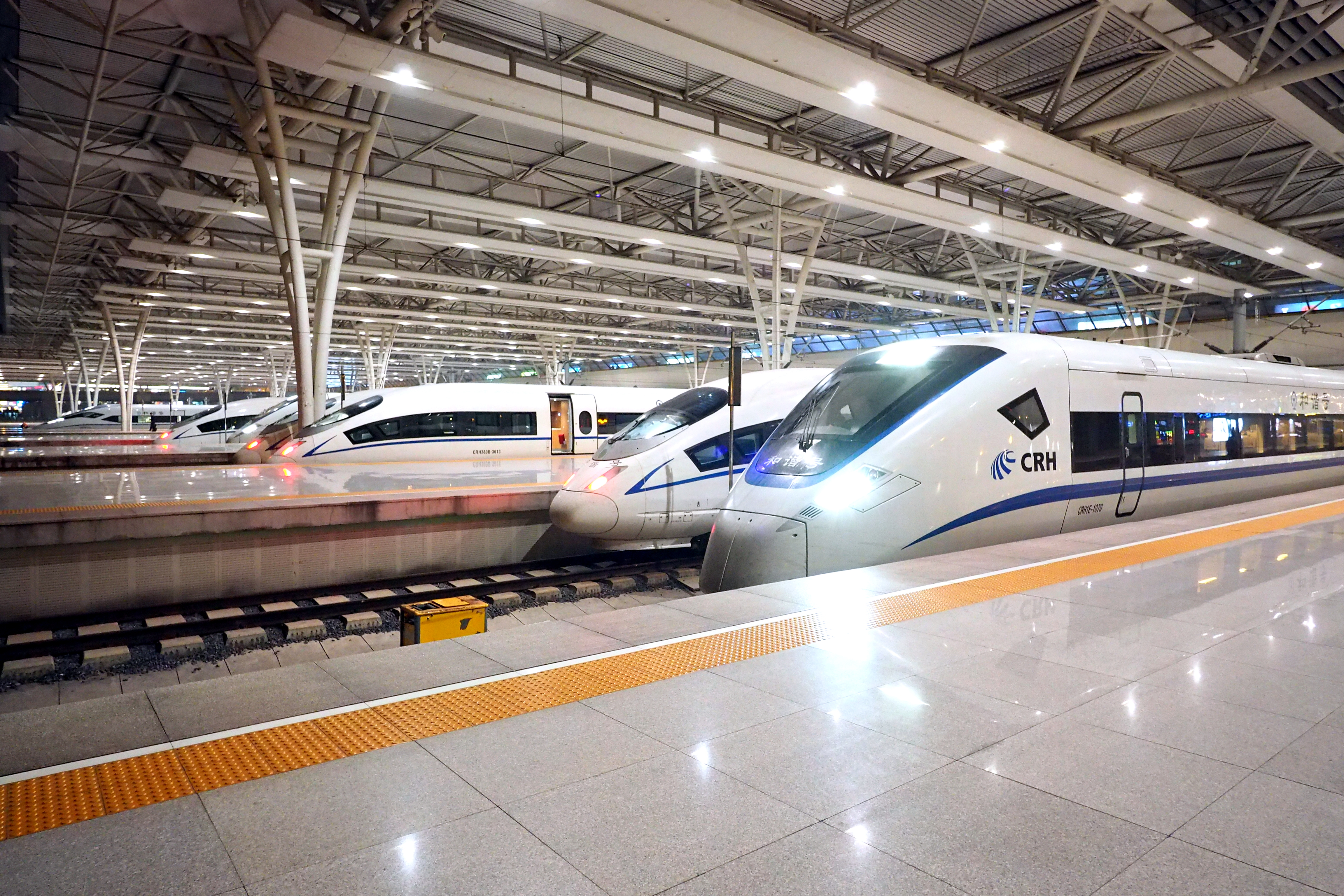 CRH1E與其他CRH系列動車組正在上海虹橋站整備